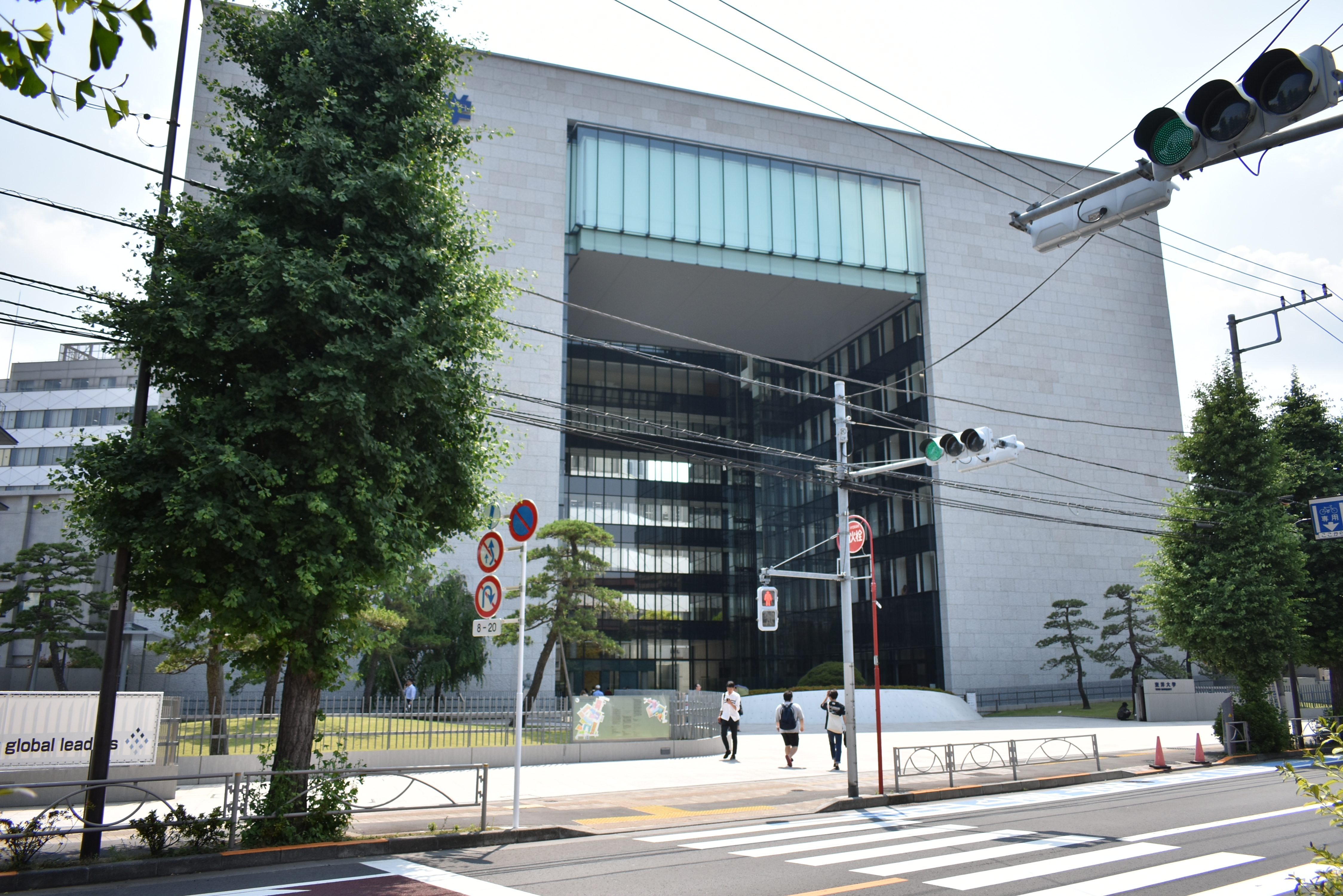 東洋大学 白山キャンパス